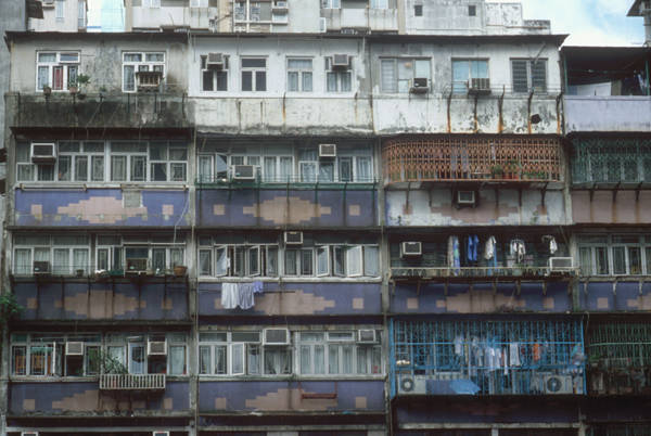 otra fachada de kowloon